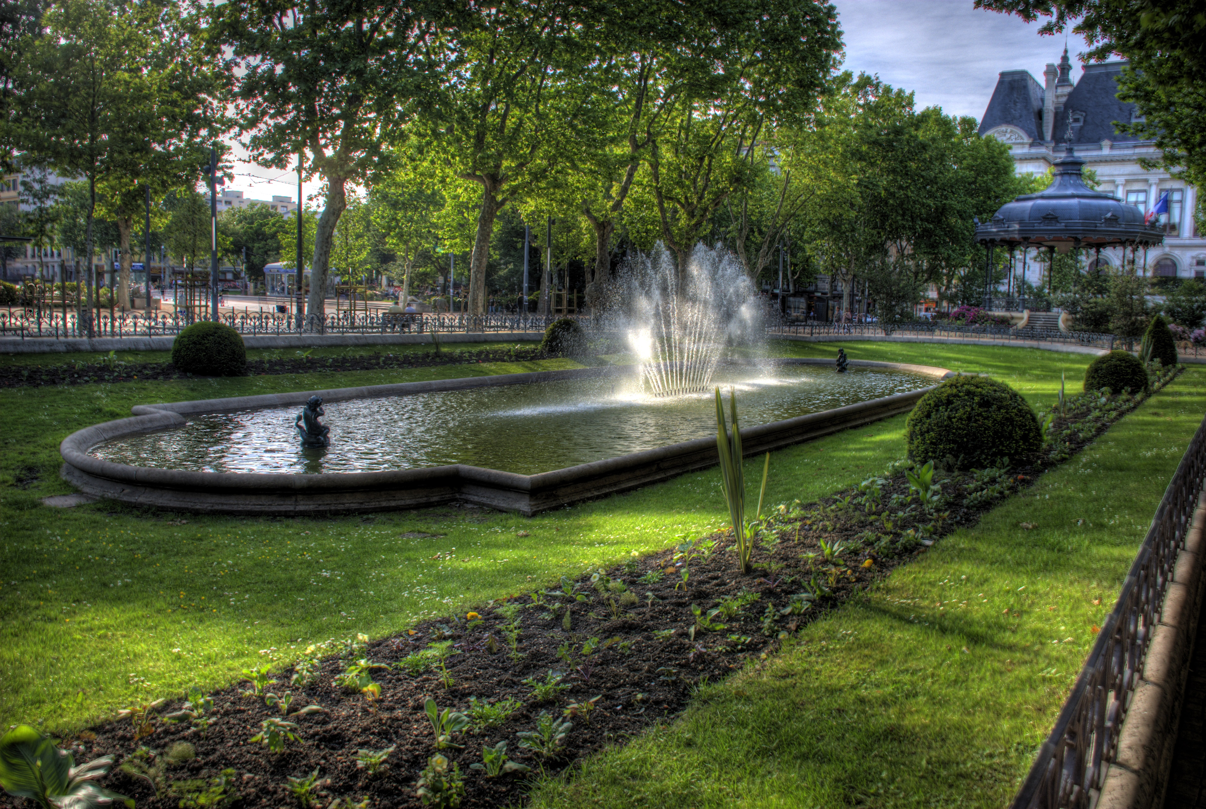 Place jean jaures a Saint etienneForbidden Garden